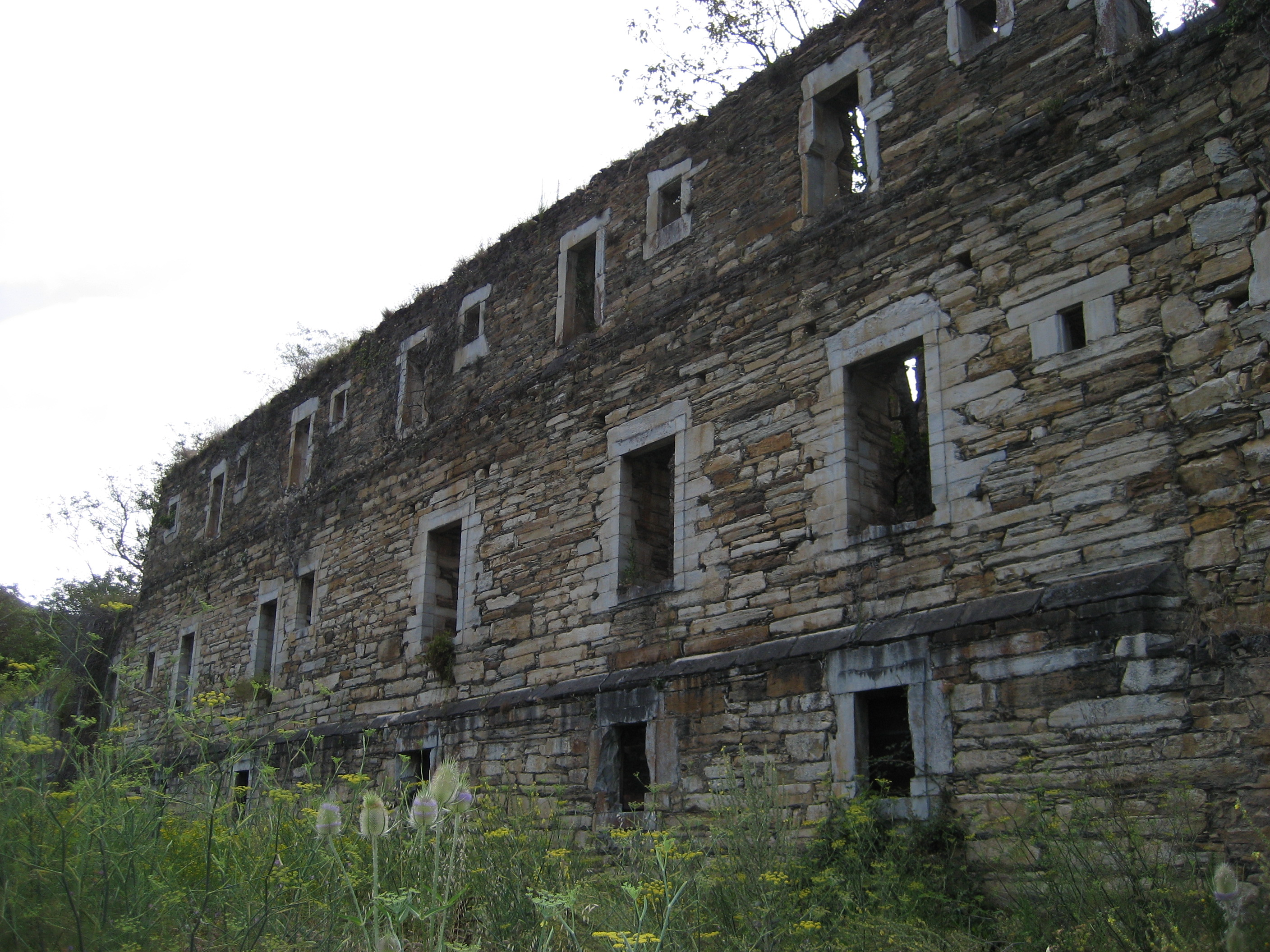 Fachada Meridional. Monasterio de San Pedro de Montes